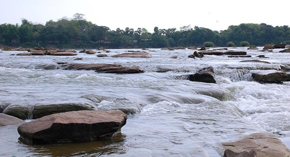 แก่งสะพือ อ.พิบูลมังสาหาร จ.อุบลราชธานี